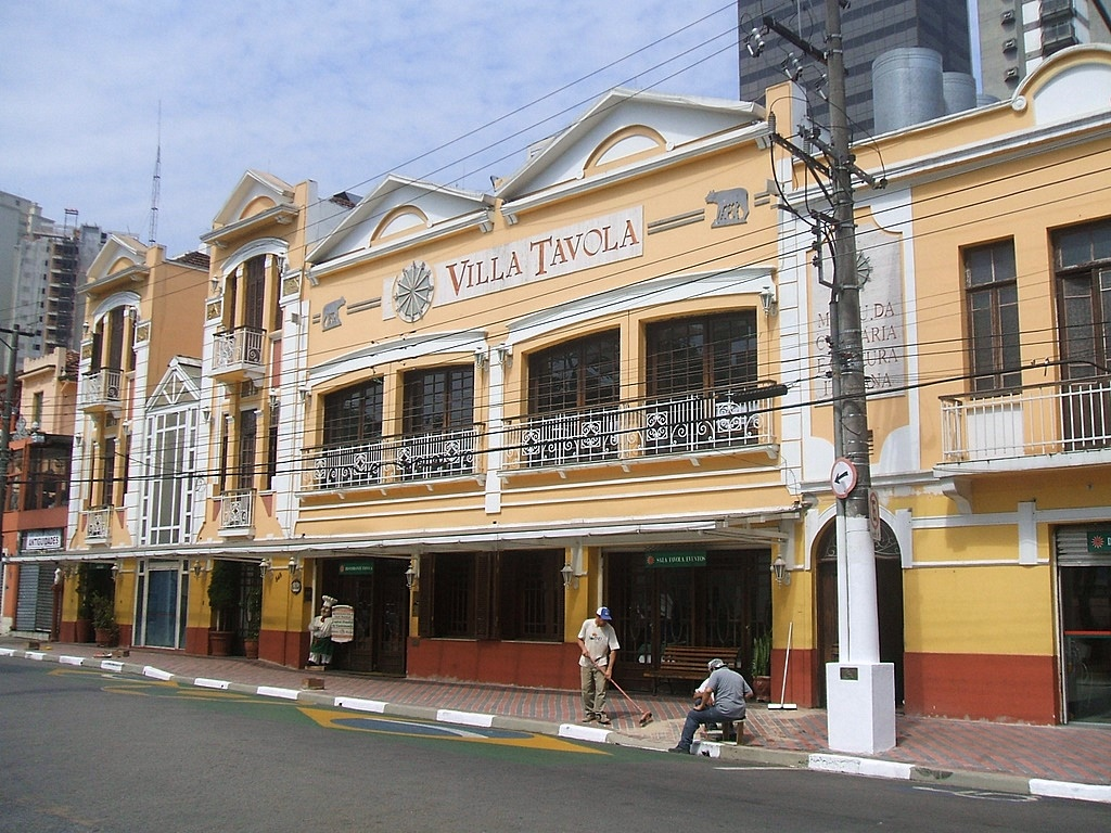 Vila Távola, na Rua Treze de Maio, no Bixiga, centro de São Paulo, Brasil